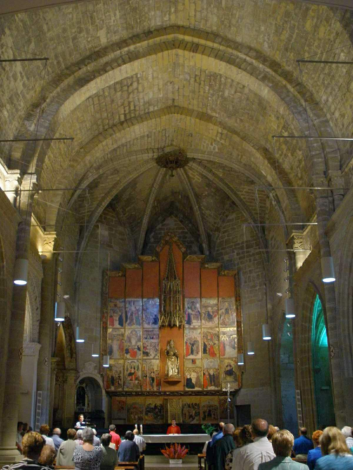 Iglesia de San Salvador, Ejea de los Caballeros (Zaragoza)